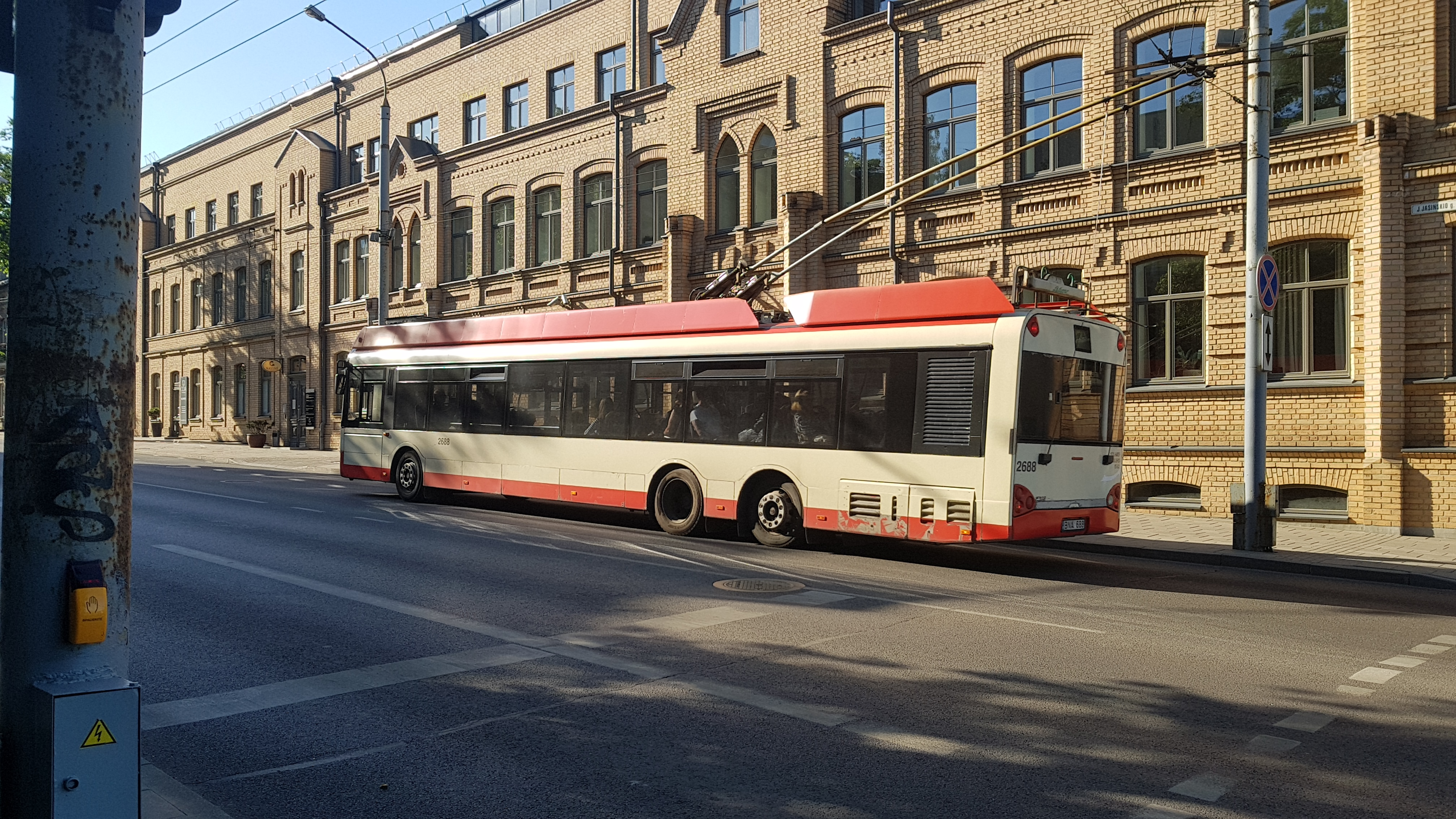 Solaris Trollino 15AC -johdinauto Vilnan keskustassa, Liettuassa